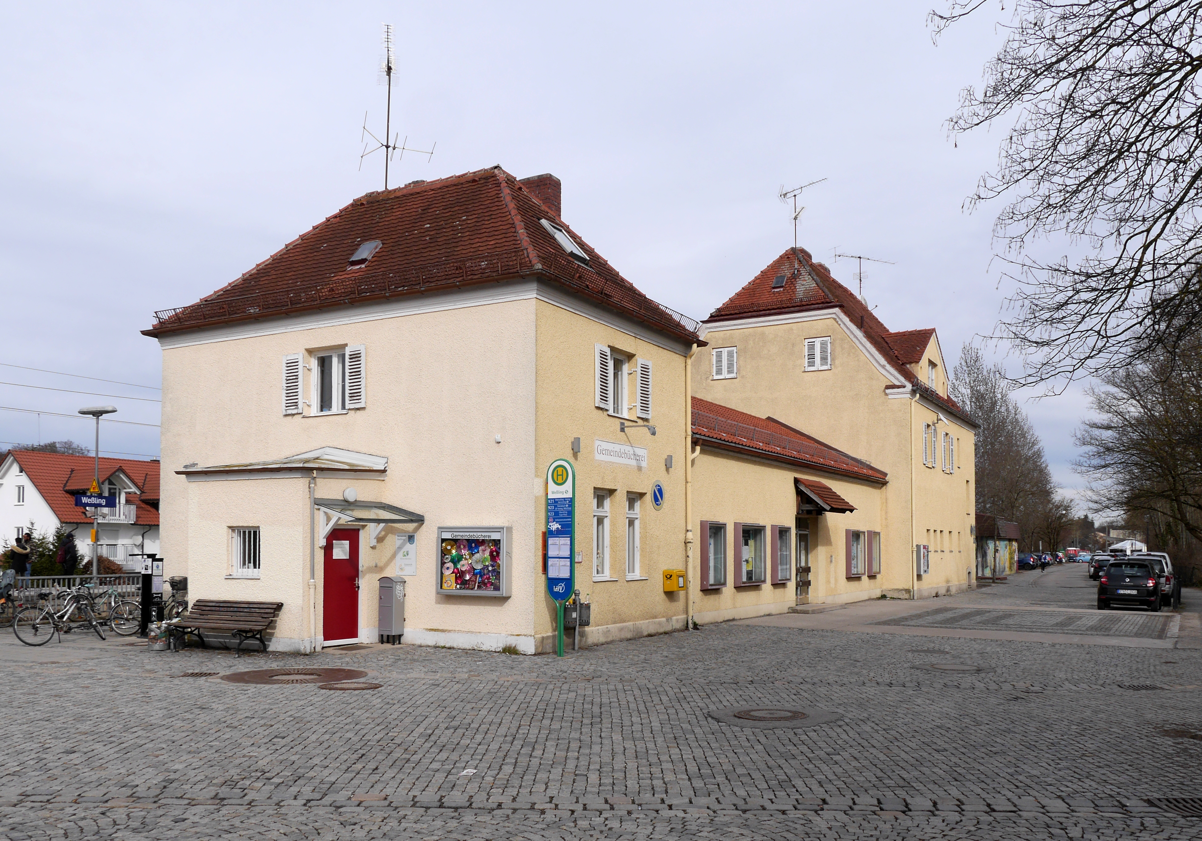 Empfangsgebäude des Bahnhof Weßling (Oberbay) von der Straßenseite, Blick aus Richtung Südwesten